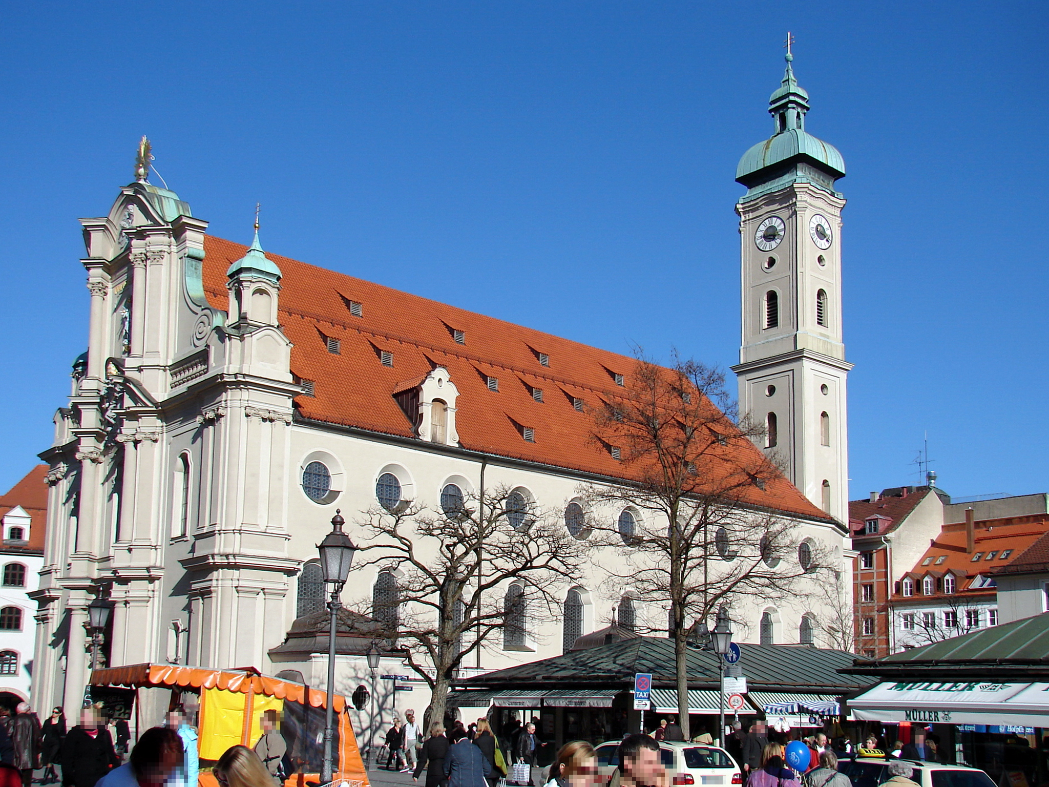 Die katholische Pfarrkirche Heilig-Geist gehört zu den ältesten erhaltenen Kirchengebäuden Münchens.